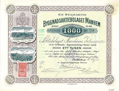 Aktie i Byggnads AB Manhem